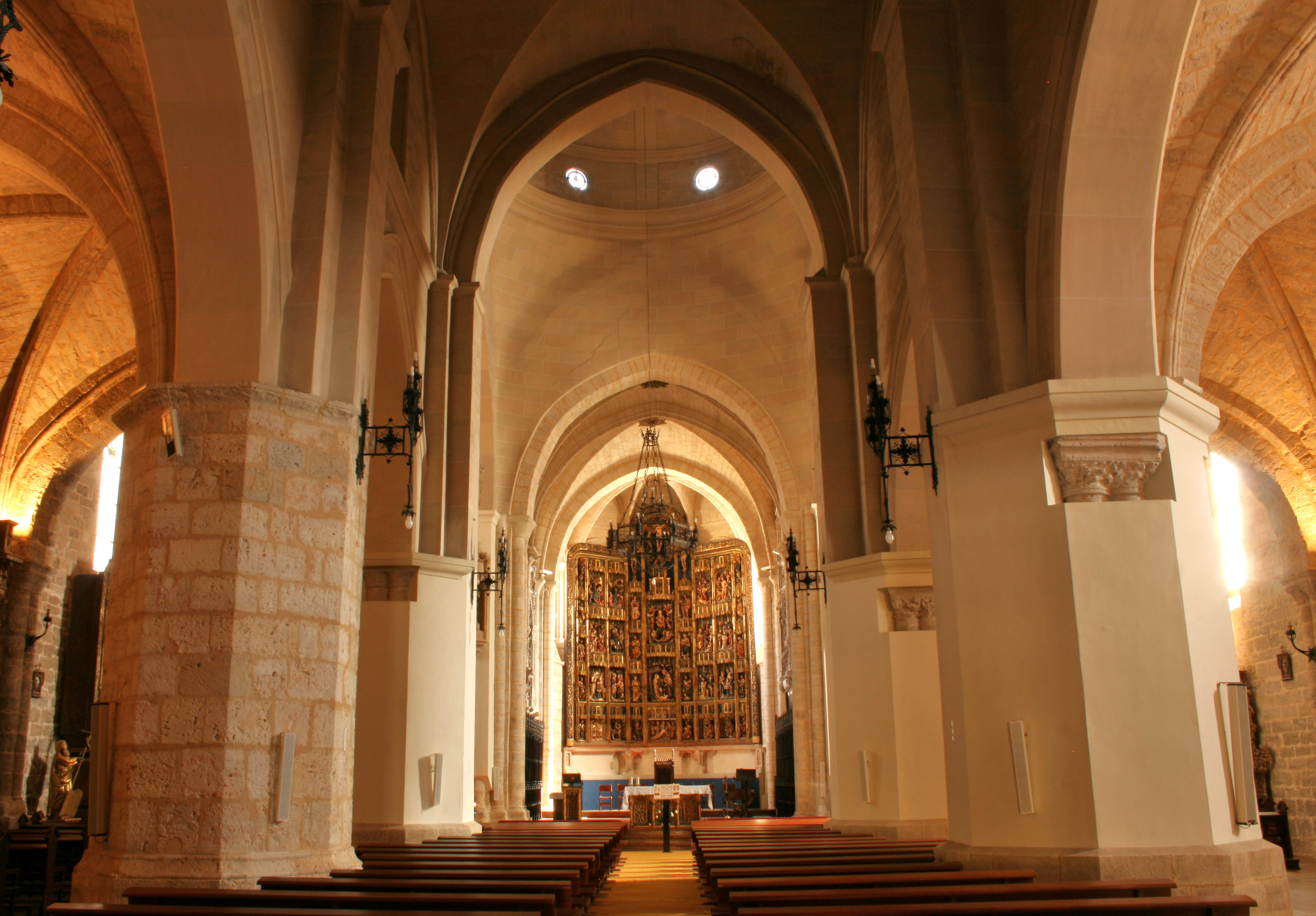 Vista del interior de la iglesia parroquial de Dueñas